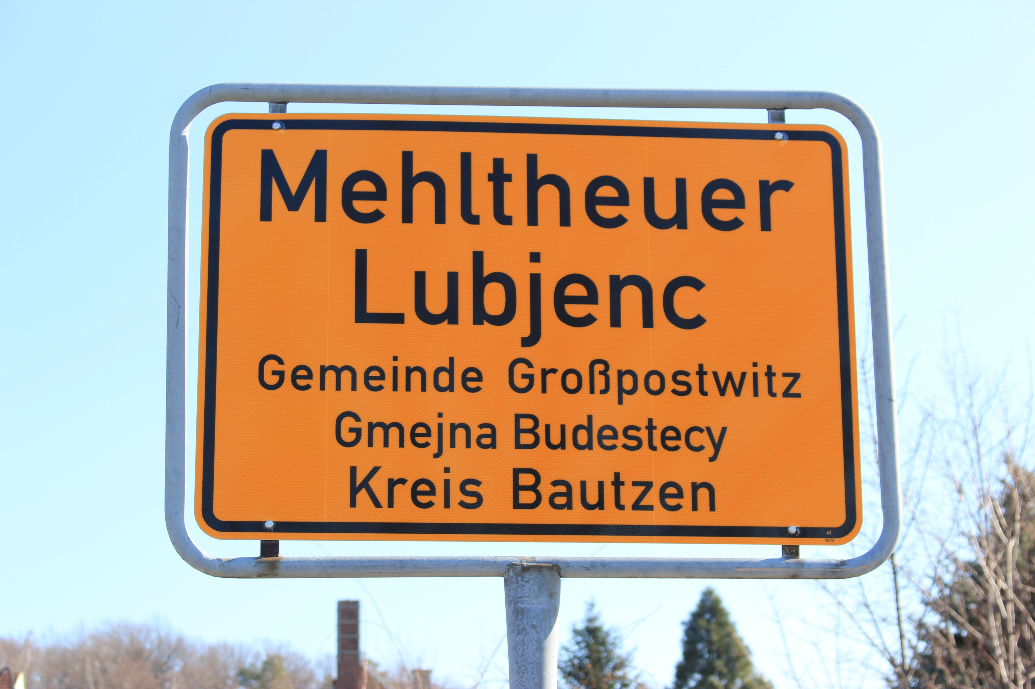 Hornjoserbsce: Wjesna tafla w Lubjencu